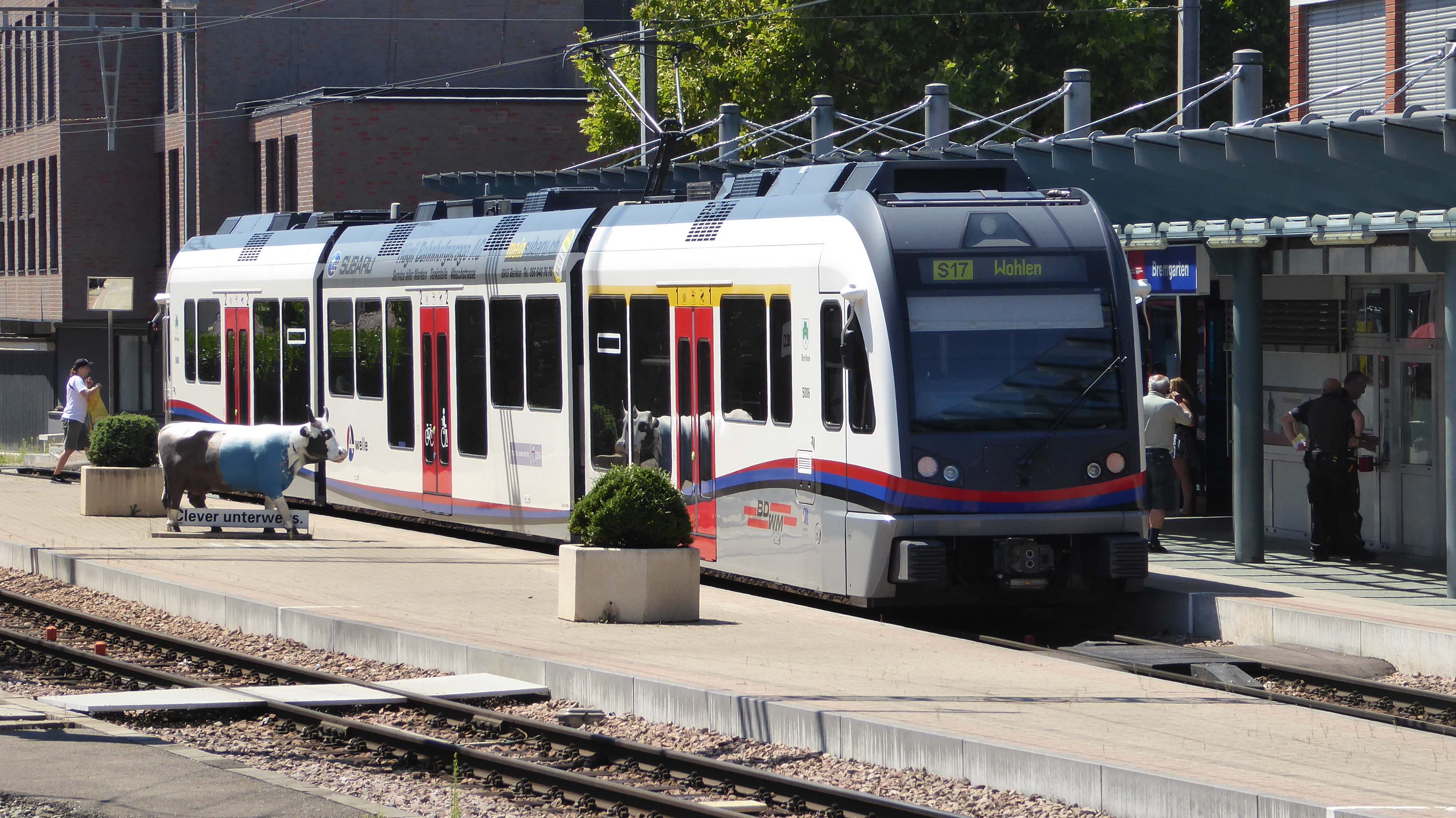 BDWM Diamant 5006 in Bremgarten